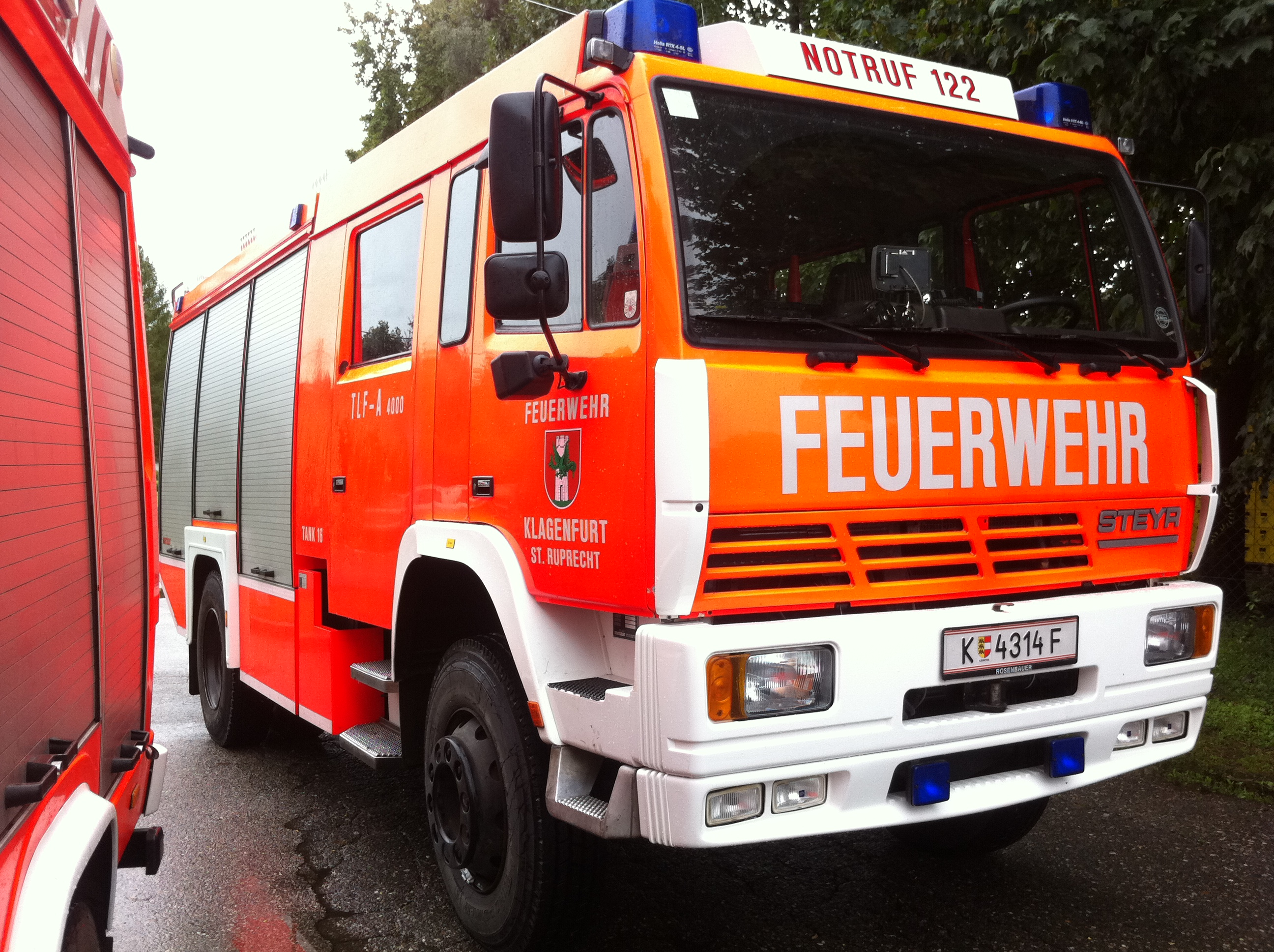 Das Tanklöschfahrzeug 16 der Feuerwehren der Stadt Klagenfurt